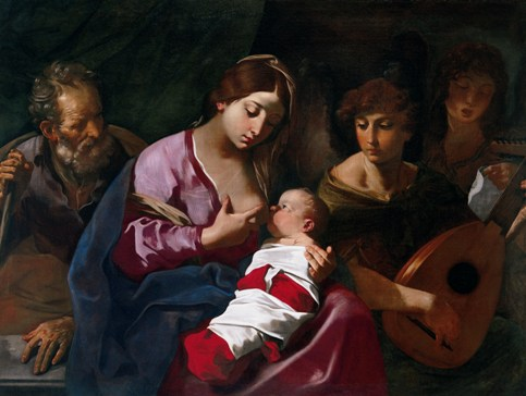 Sagrada Familia con ángeles músicostitle QS:P1476,es:"Sagrada Familia con ángeles músicos"